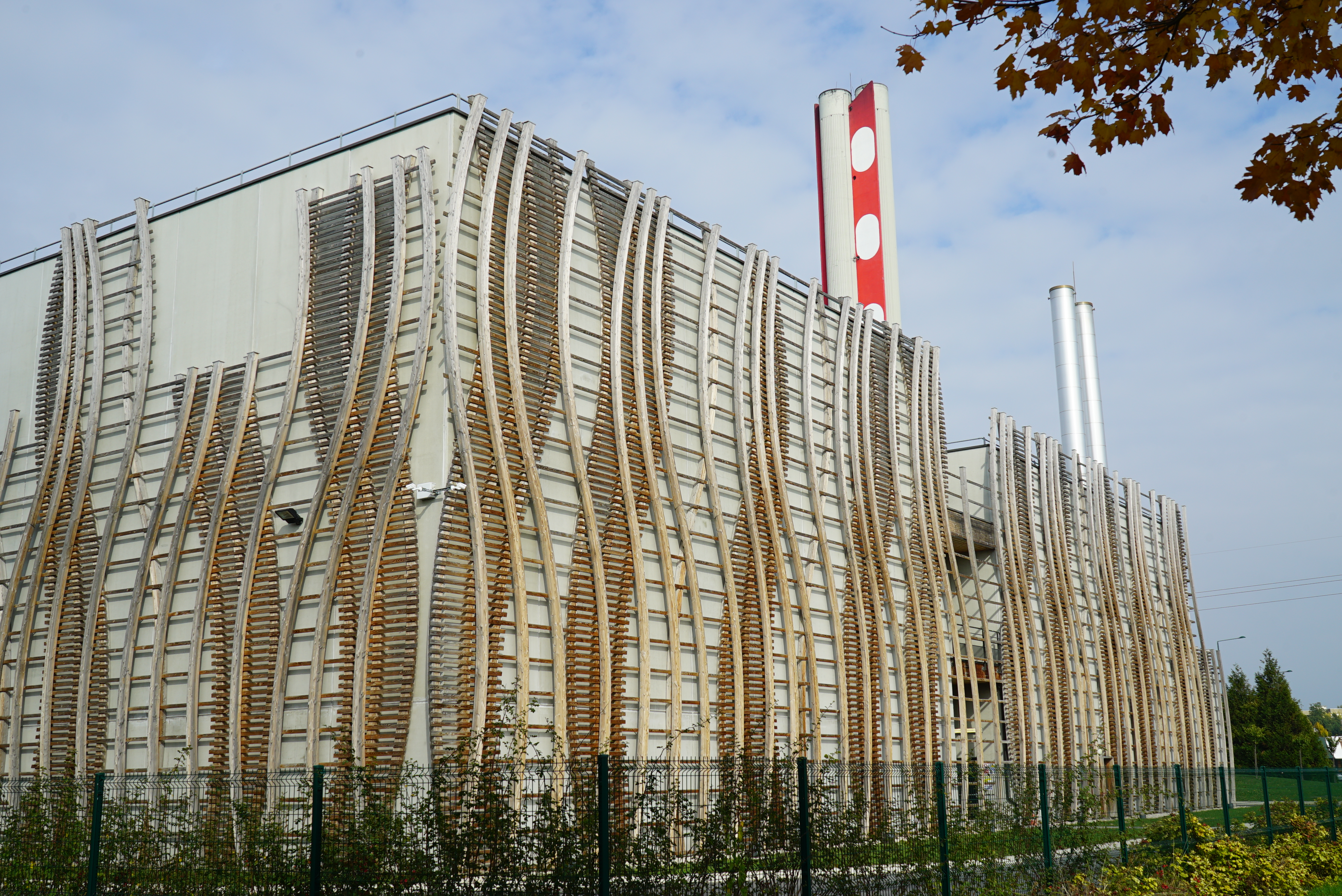 production de chauffage collectif avec installation à bois.